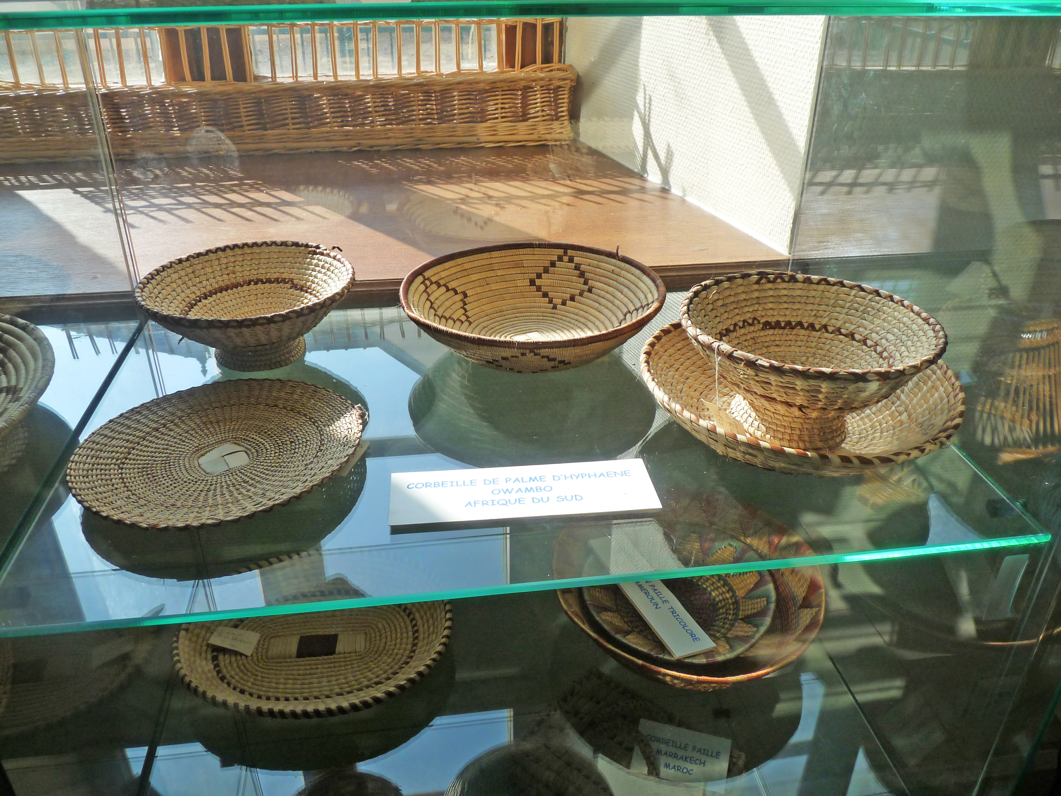 Vanneries africaines (notamment Ovambo) à la Maison de la Vannerie (Fayl-Billot, Haute-Marne)